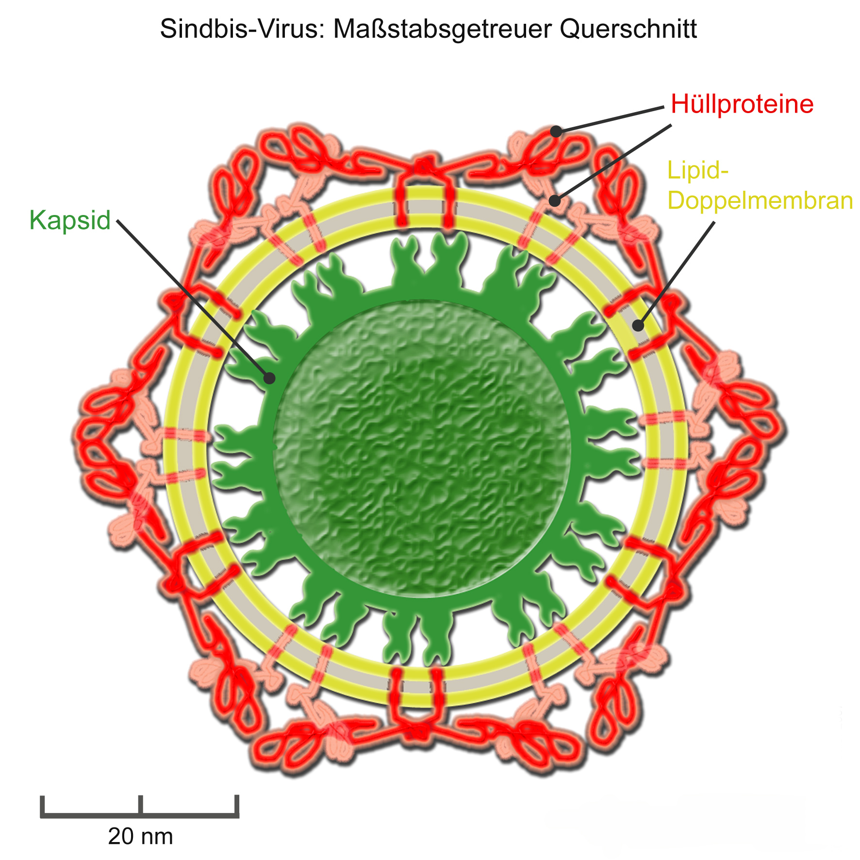 Maßstabgetreues Modell des Sindbis-Virus nach den Cryo-Elektronenmikroskopischen Aufnahmen und Dichtemessungen von W. Zhang et al. J. Virology (2002) 76: 11645–11658 (Fig. 1) PMID 12388725